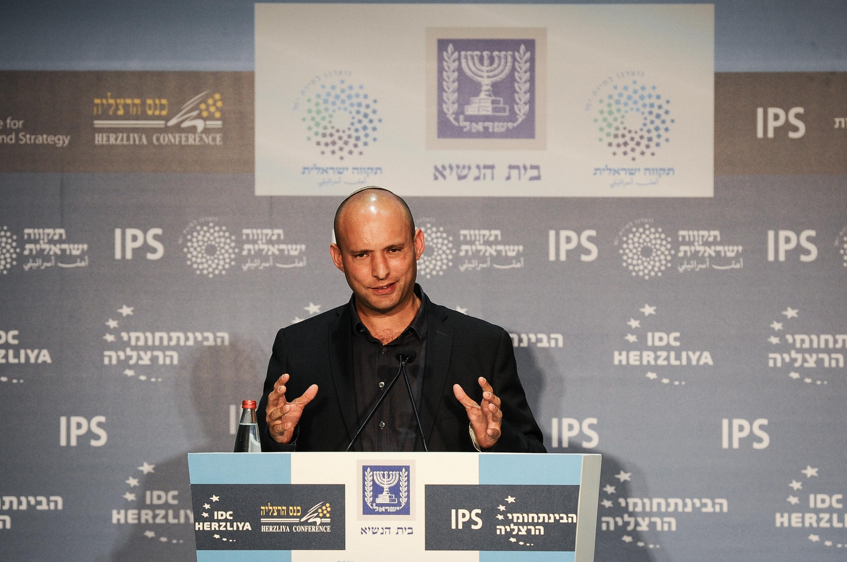 נפתלי בנט בכנס הרצליה 2016 בבית הנשיא